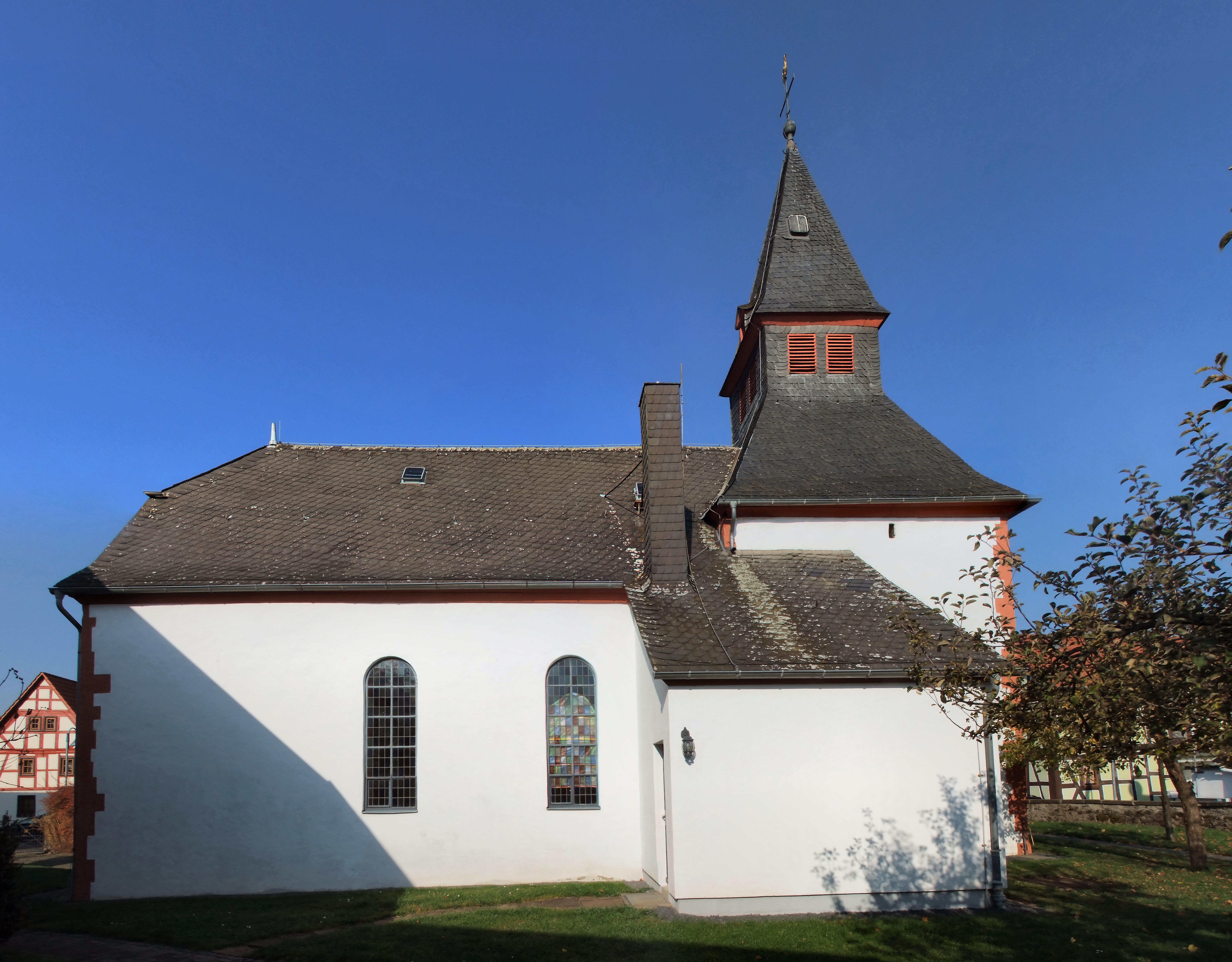 Evangelische Kirche in Ettingshausen, Gemeinde Reiskirchen, Landkreis Gießen, Hessen, Deutschland